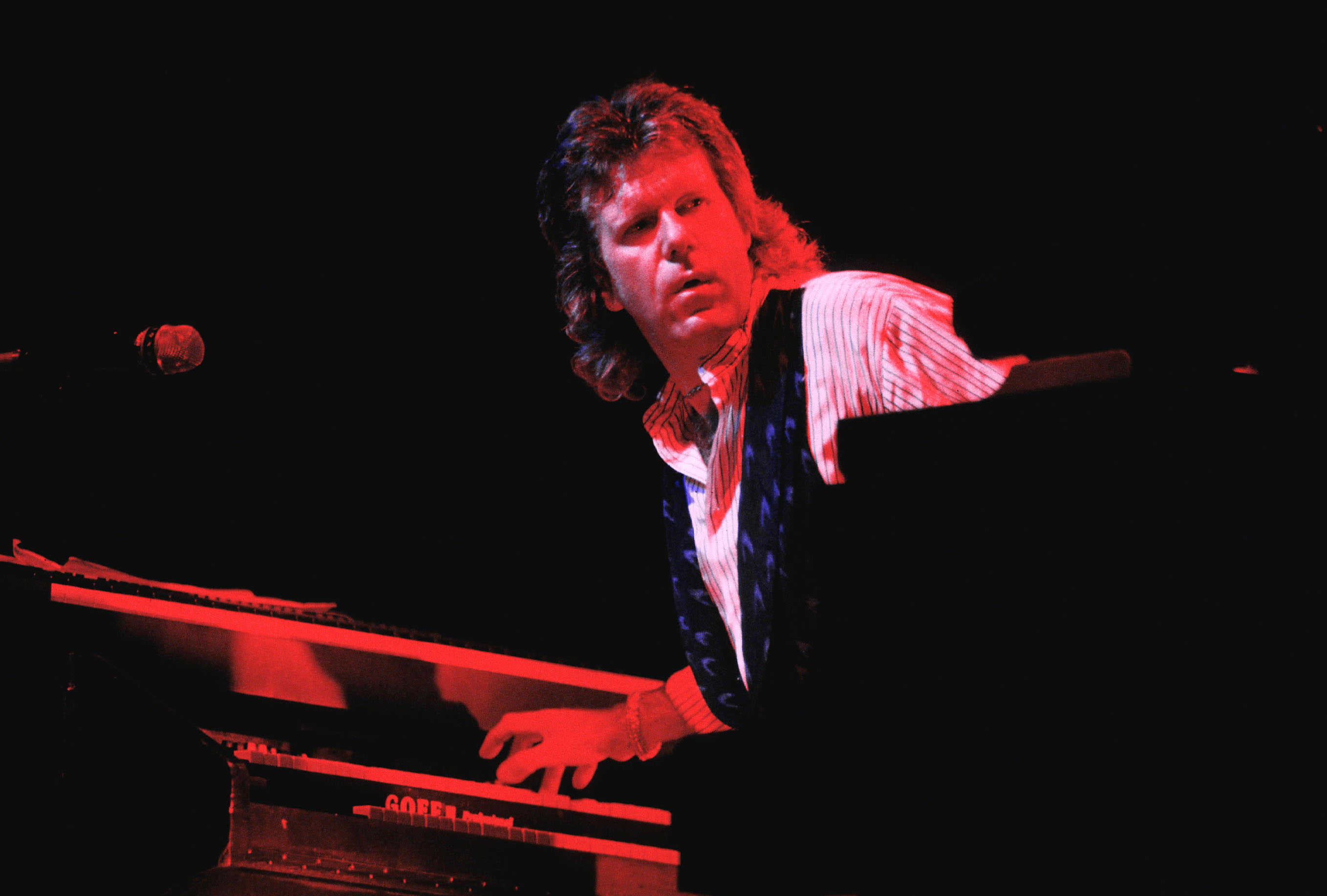 Keith Emerson del gruppo progressive-rock Emerson, Lake & Palmer in concerto nel 1992